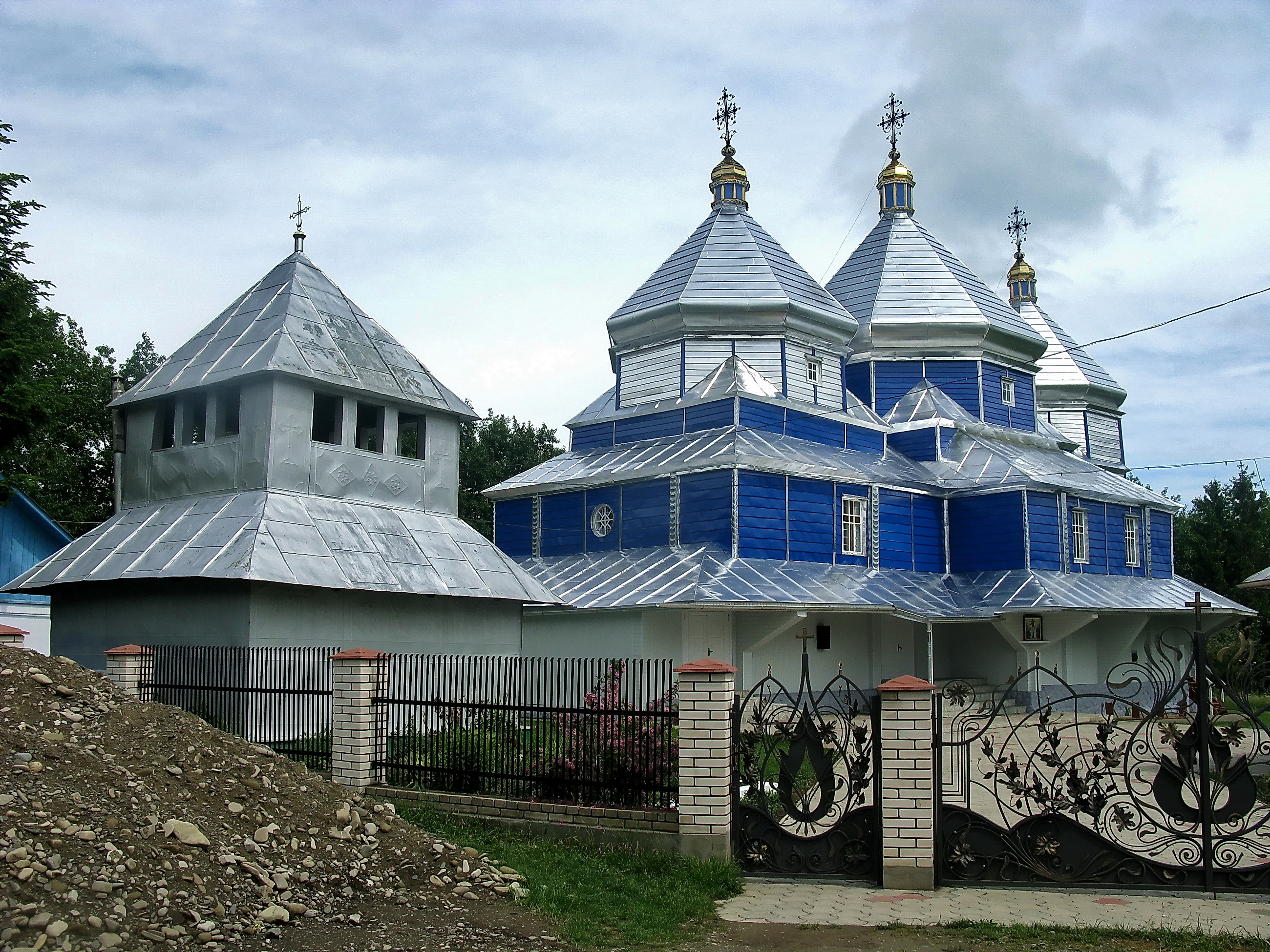 Вознесенська церква та дзвіниця (дер.), с. Іспас